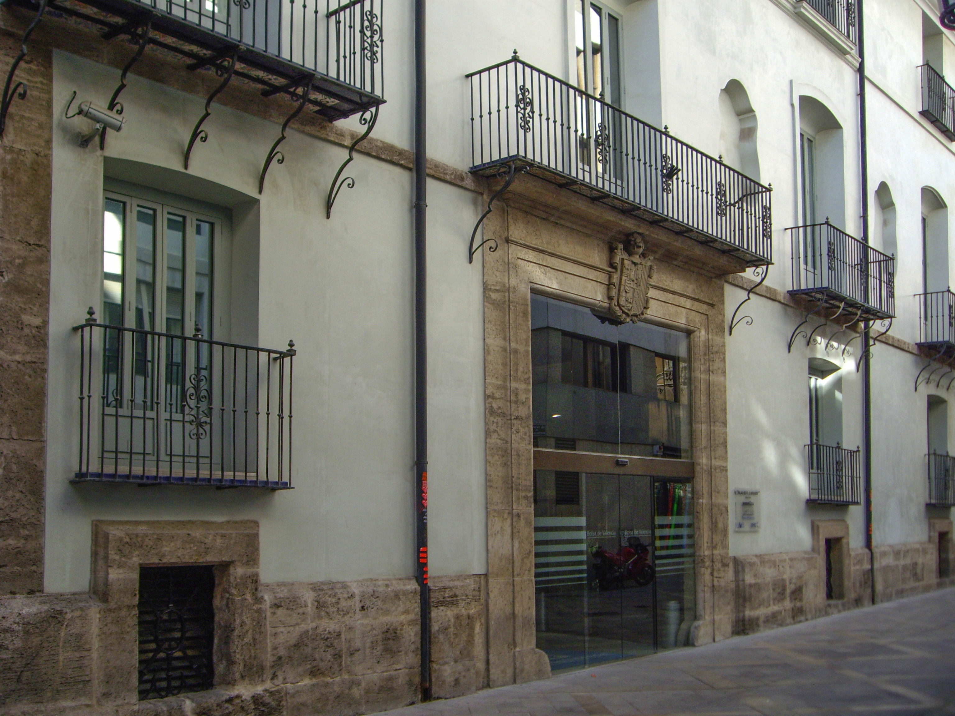 Palau dels Boïl d'Arenós, seu de la Borsa de València.